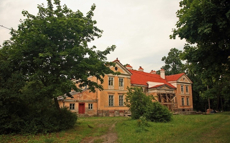 Skandławki – wieś w woj. warmińsko-mazurskim, w powiecie kętrzyńskim, w gminie Srokowo